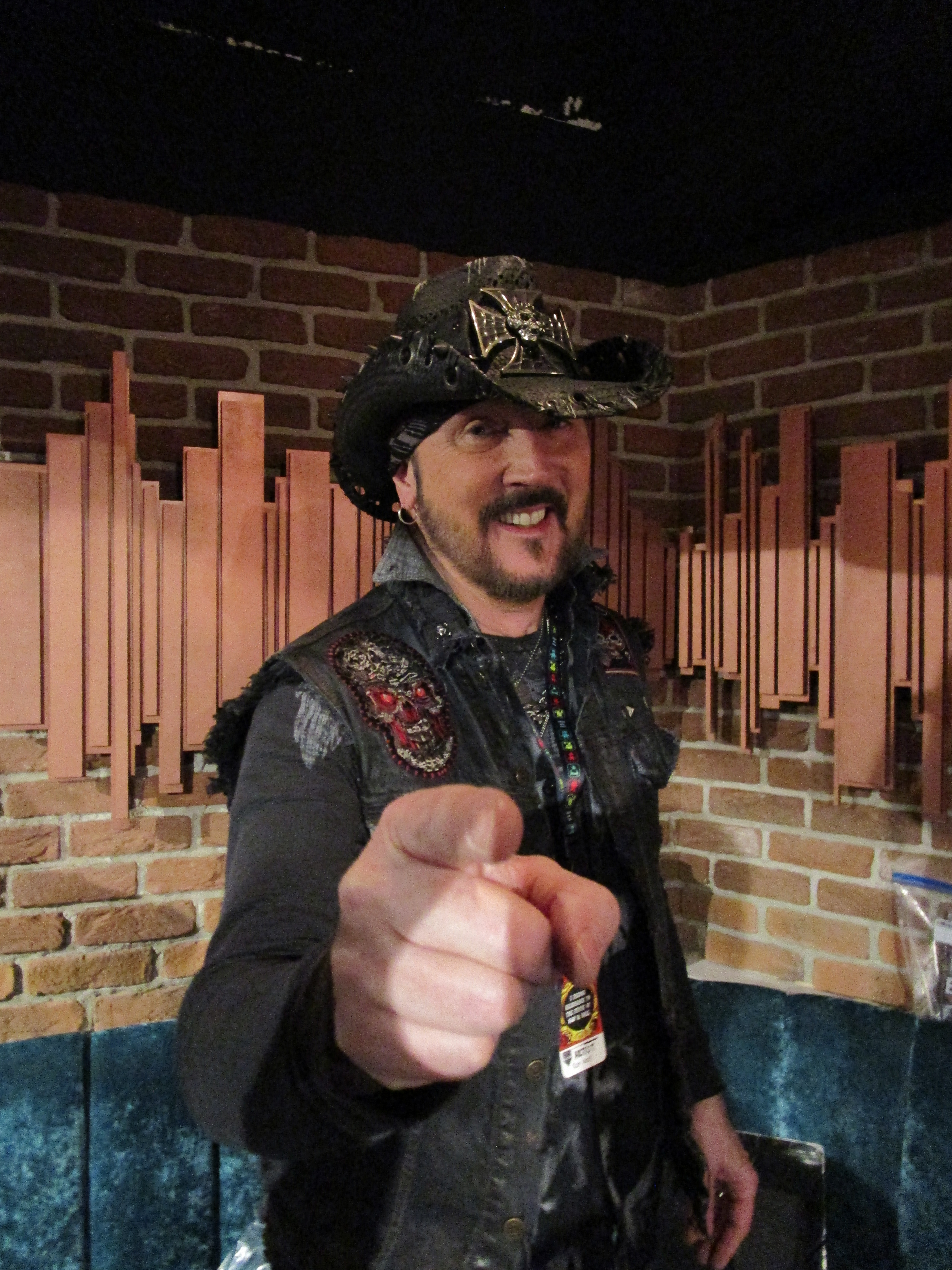 Ron Keel Helsingissä 23.3.2019.